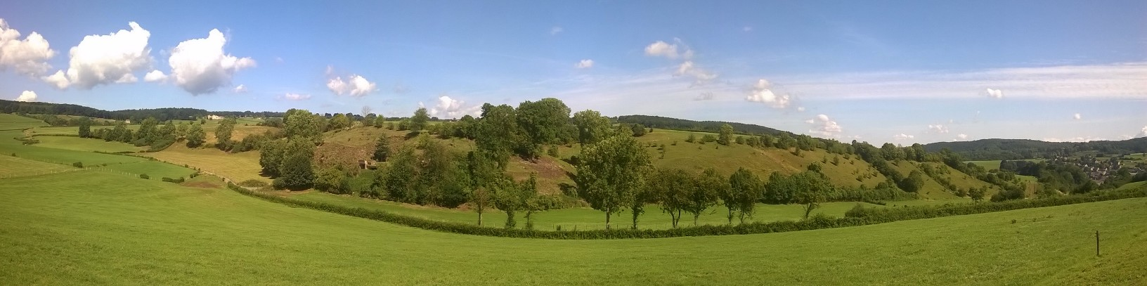 Les pelouses calcaires du coteau de Mont (3 ha), abandonnées par l’agriculture, étaient en voie avancée de recolonisation forestière, embroussaillées à 80 %. Depuis 2010, le site de haut intérêt écologique, restauré par l'asbl Natagora (pâturage de moutons, fauchage, ramassage), retrouve progressivement sa richesse d’antan, une faune et une flore remarquables avec de nombreuses espèces rares et protégées. En son centre, l'on aperçoit une carrière désaffectée (0,47 ha), creusée à flanc de coteau, exploitée pour son calcaire dolomitique du Tournaisien, unique en Wallonie.